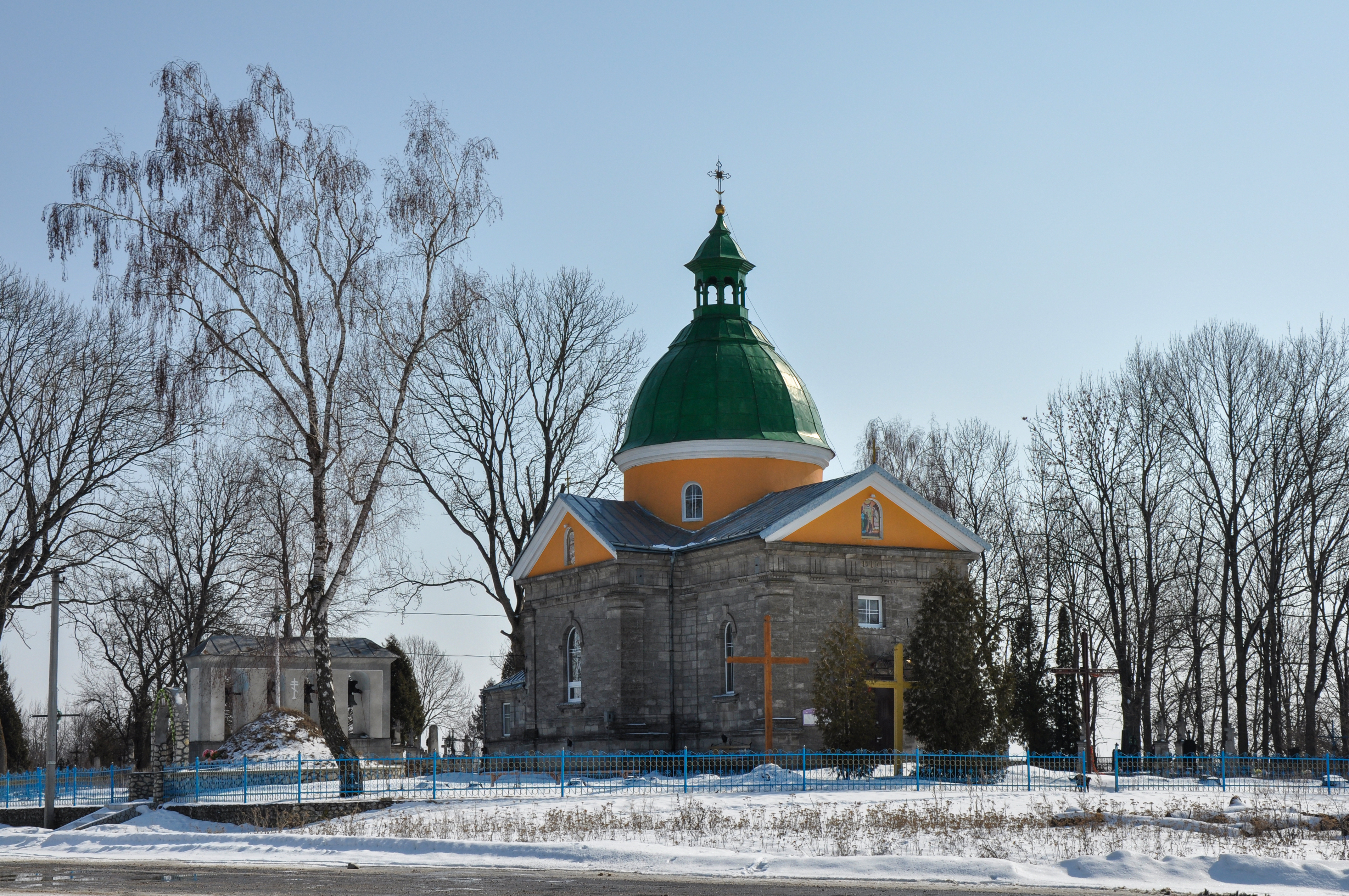 Церква Пресвятої Діви Марії (мур.), Климківці